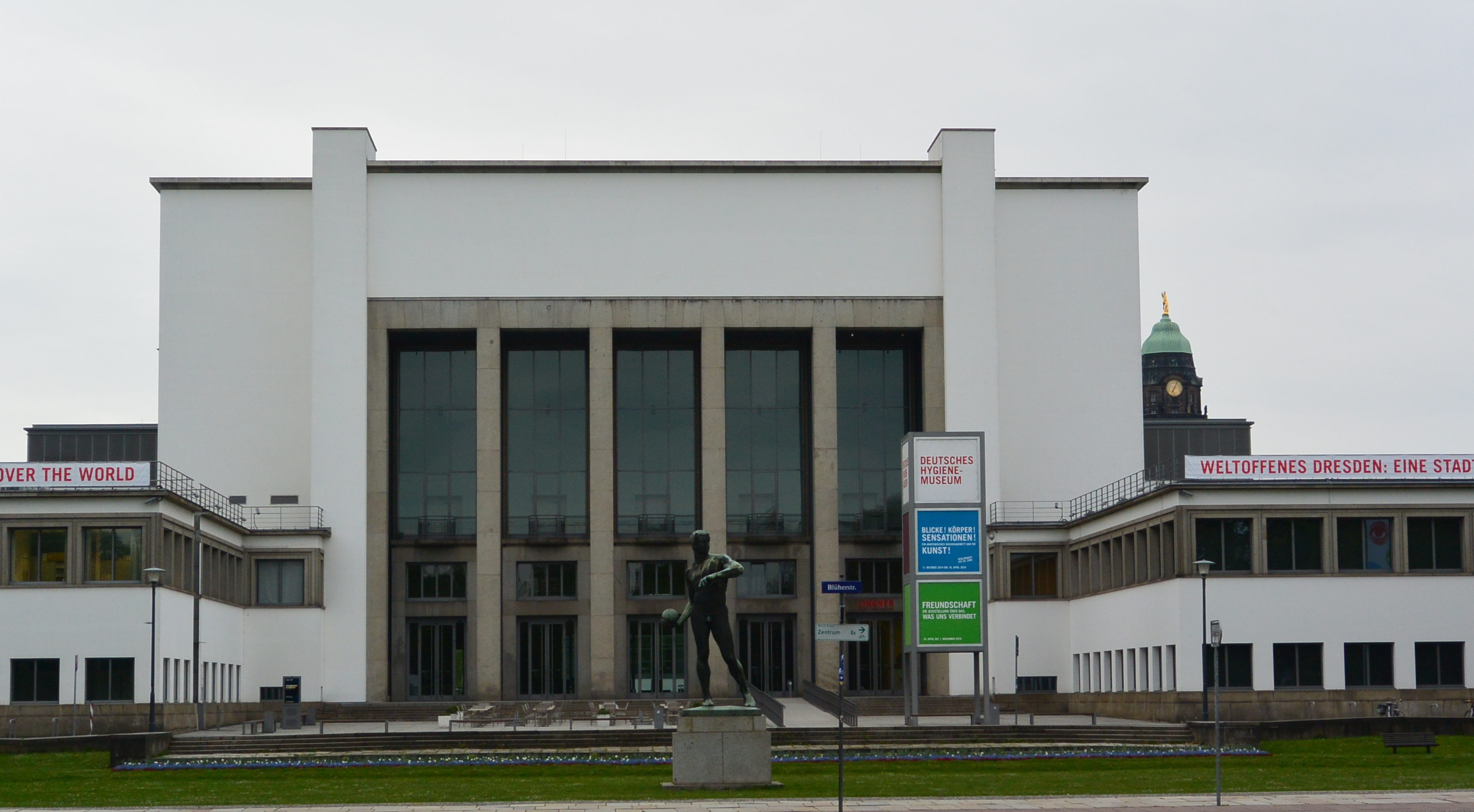 Ballwerfer von Richard Daniel Fabricius vor dem Deutschen Hygiene-Museum Dresden und rechts im Hintergrund der Goldene Rathausmann von Richard Guhr auf dem Neuen Rathaus